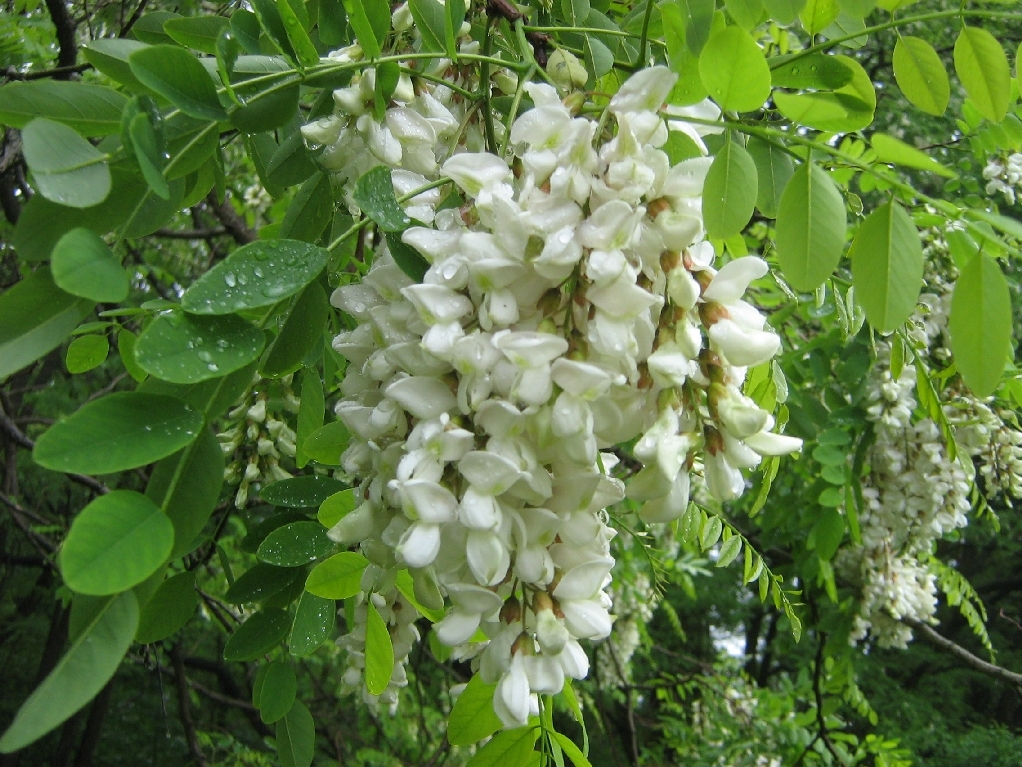 Gemeine Robinie, Robinia pseudoacacia, Blütenstand. Fotografiert in einem Wald bei Petzow am Schwielowsee.